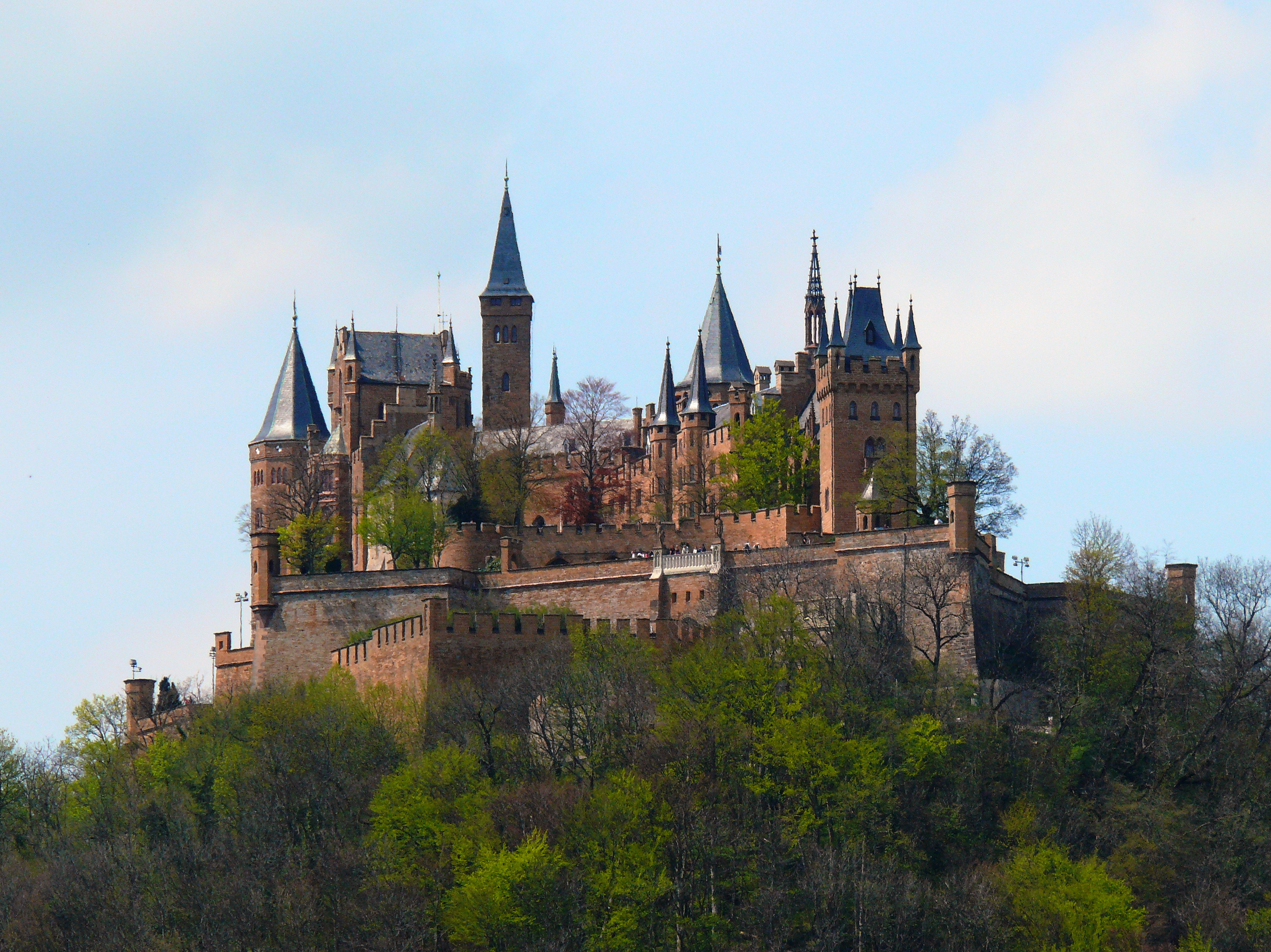 Burg Hohenzollern im Blick von Mariazell